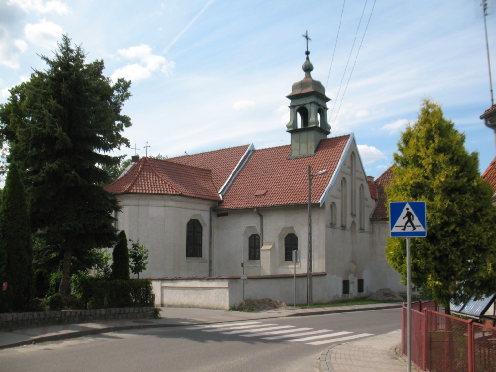 Dzierzgoń, ul. Krzywa 5 - dawny kościół klasztorny reformatów, obecnie filialna cerkiew greckokatolicka, p.w. św. Ducha, 1717